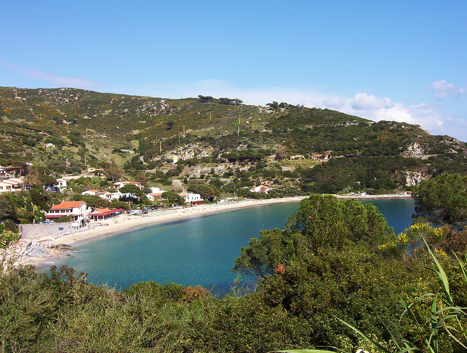 Isola d'Elba - Spiaggia di Cavoli